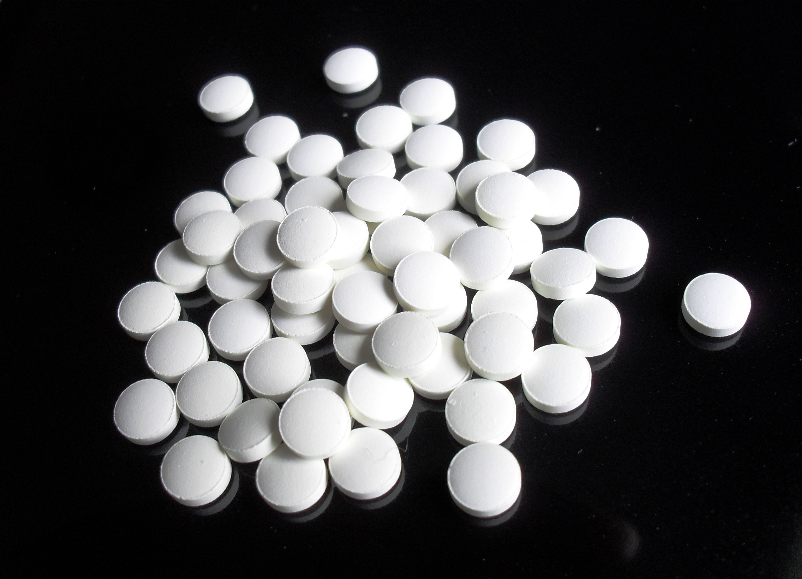 finasteride